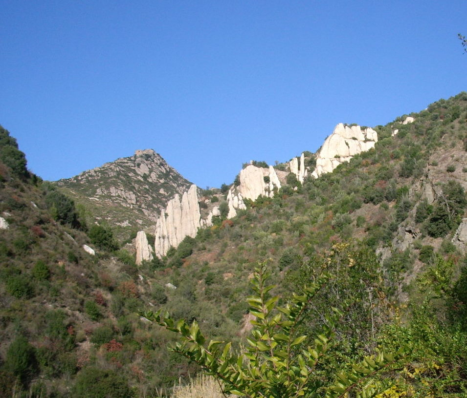 Sant Salvador de les Espases